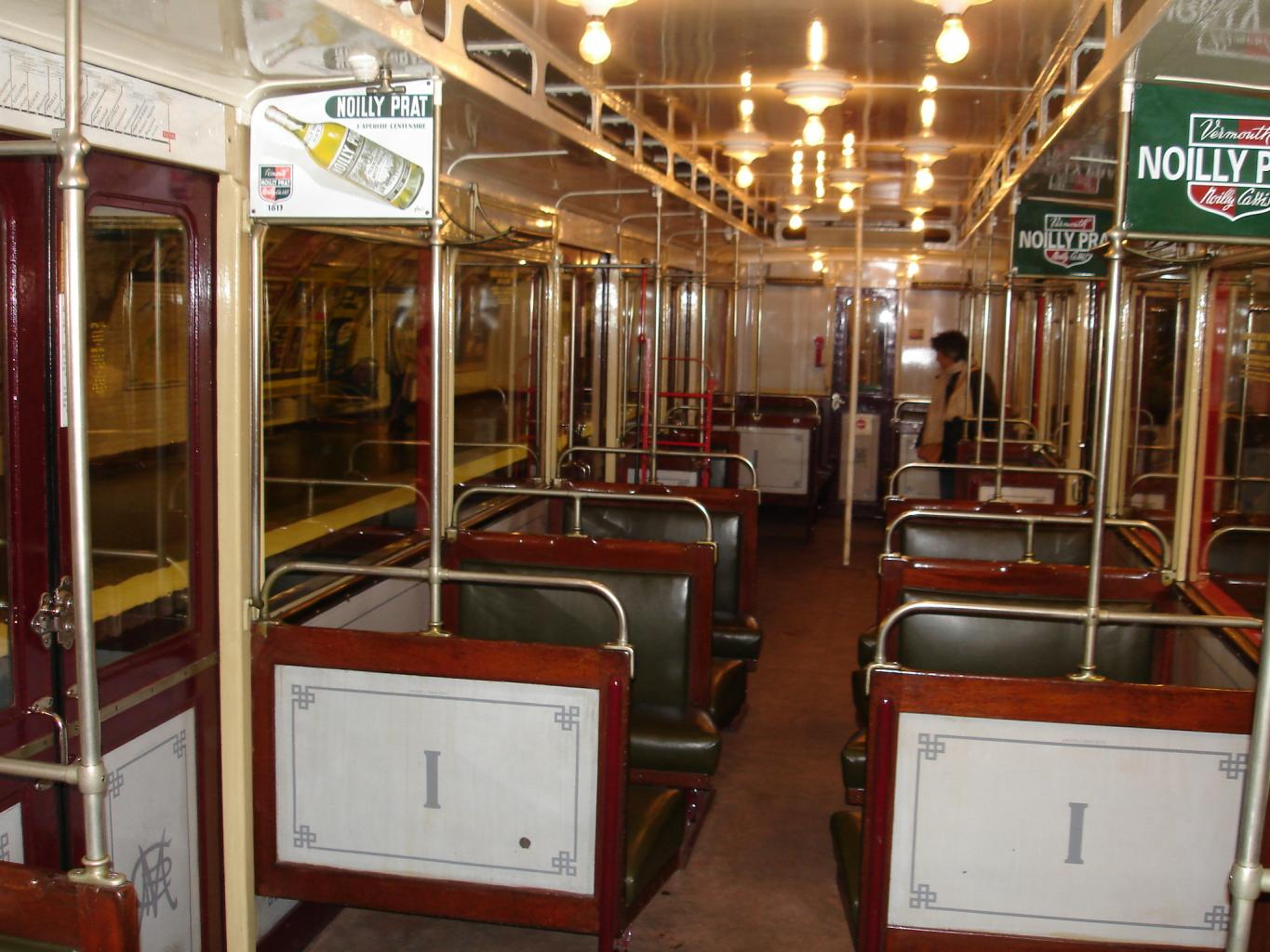 Rame de métro Sprague-Thomson - Interieur de 1ere classe Circulation spéciale du 24 mars 2007 sur la ligne 12 du métro parisien Photo personnelle de Clicsouris